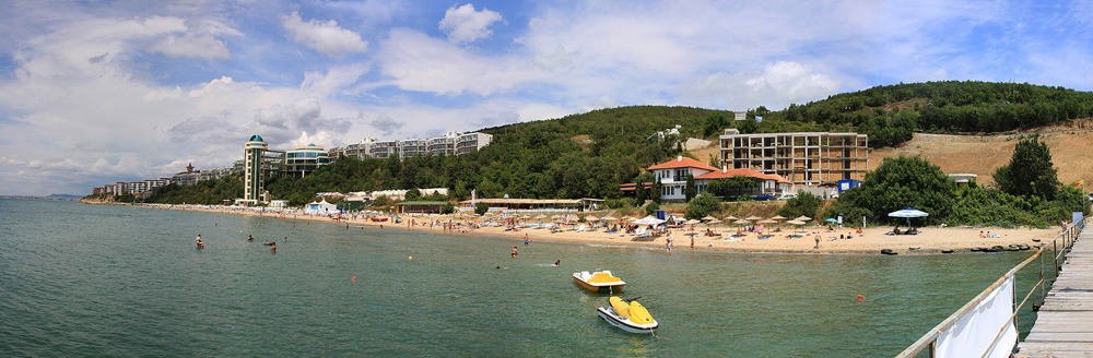 Święty Włas